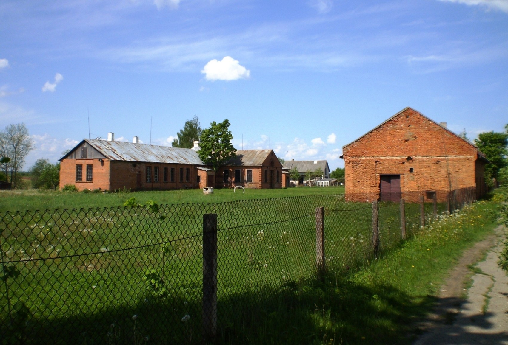 Dotnuvos lentpjūvė, Dotnuva, Kėdainių raj.